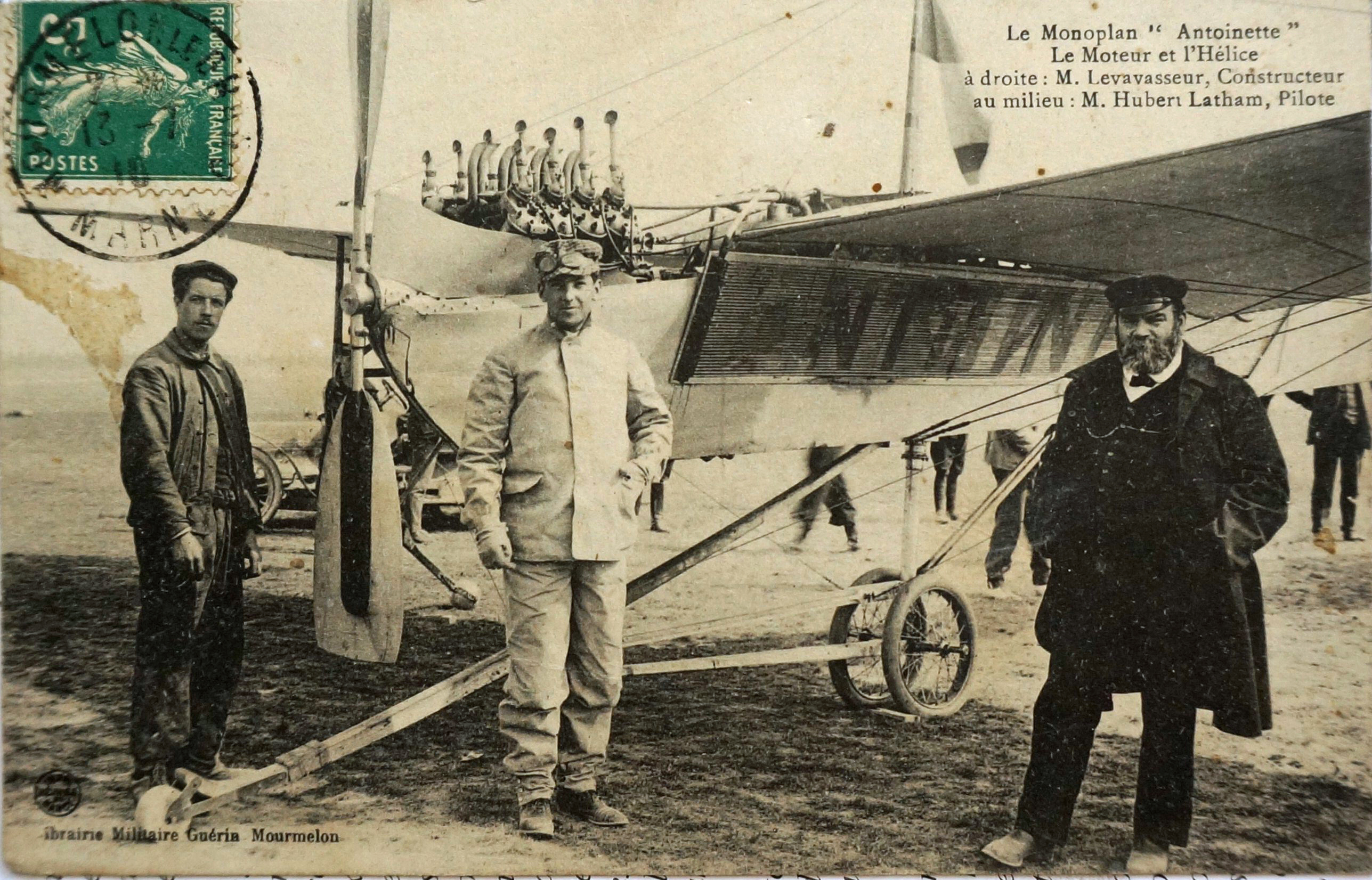 carte postale avec Latham Levavasseur de la collection de Mme Bieri.